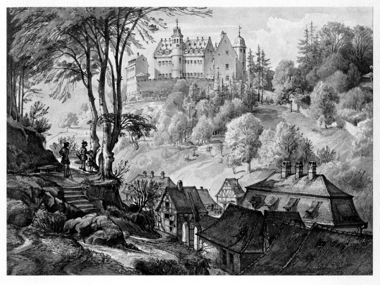 Schloss Schönberg bei Bensheim, 1851. Federzeichnung auf Papier, schwarz-weiß